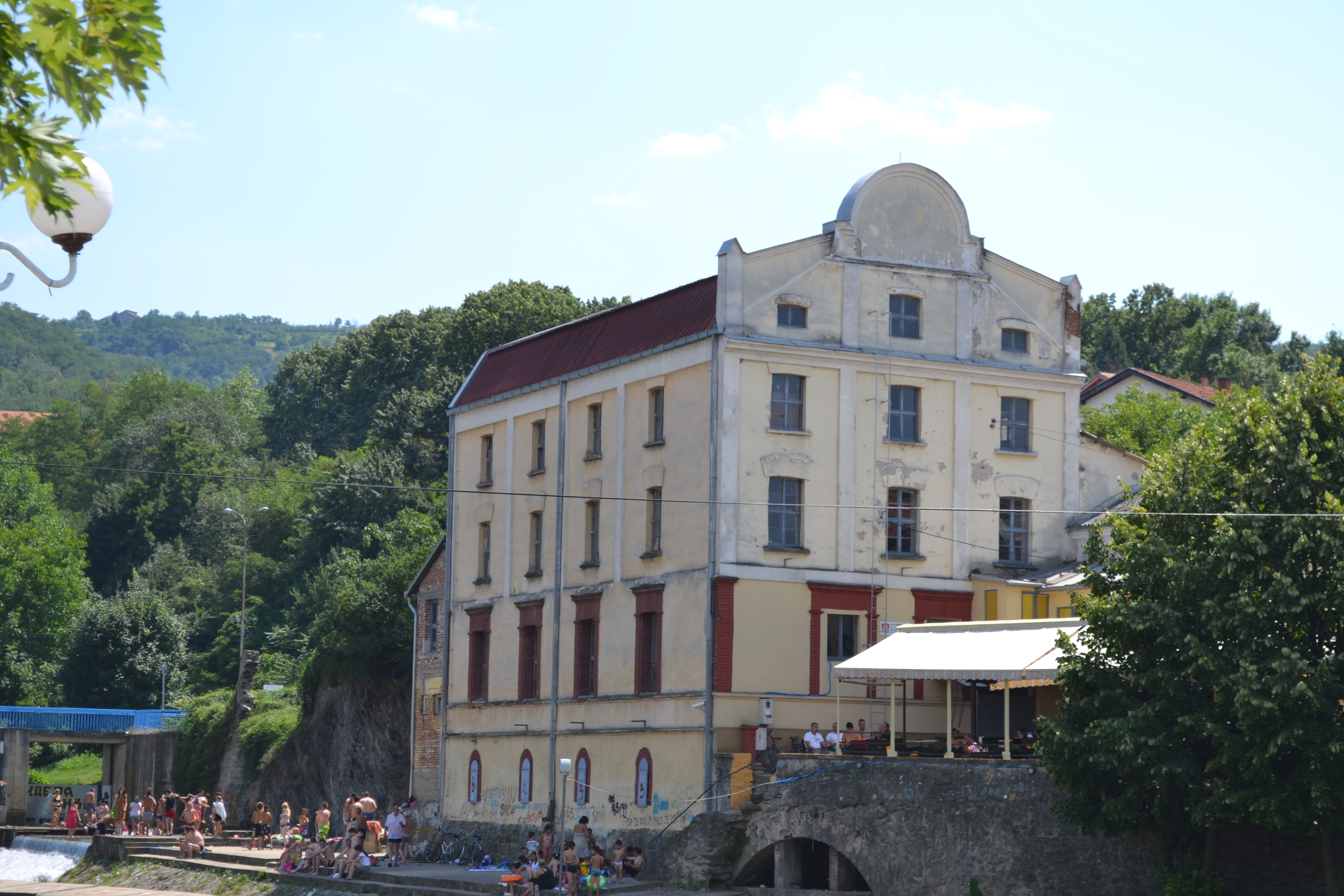 Mill in Vlasotince